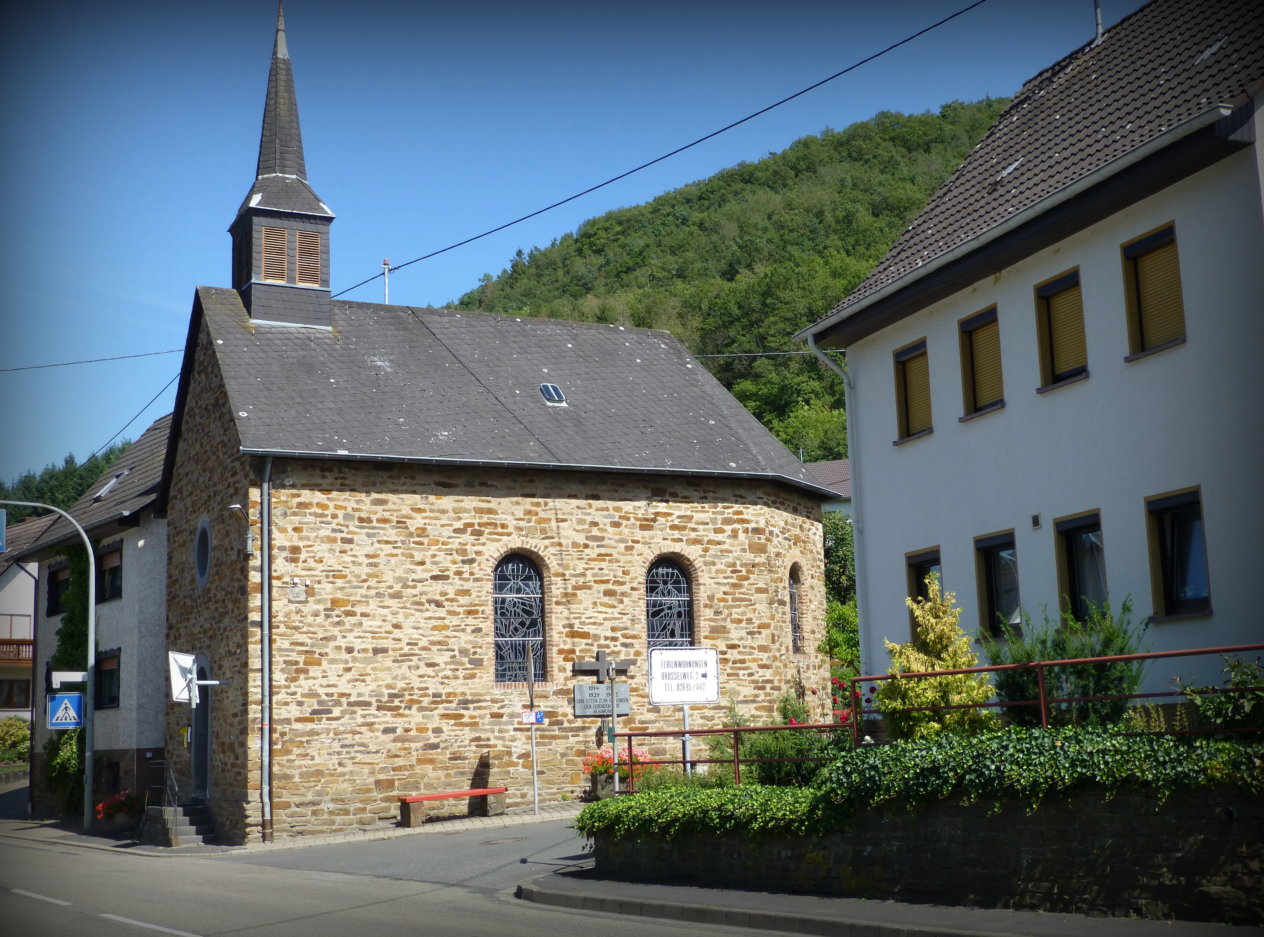 Niederadenau, Die Kath. Kirche St. Maria Magdalena wurde 1872 erbaut